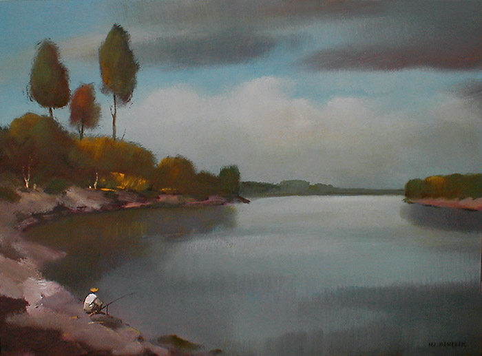 Benedek Jenő, ifj. (Csongrád, 1939. június 13.– 2019. augusztus 20.) festőművész alkotása: Ősszel a folyónál, Év n., olajfestmény, 60x80 cm